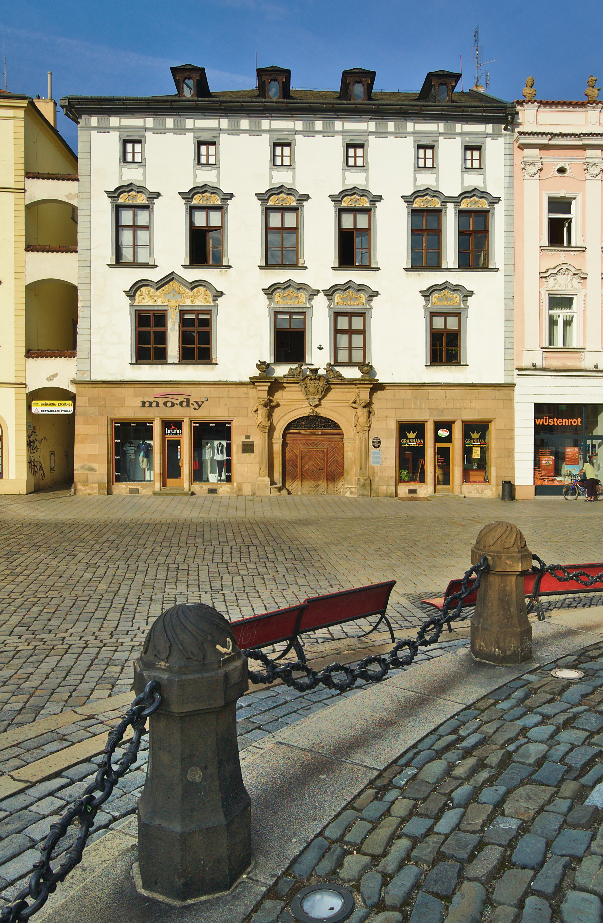 Petrášův palác, čp. 410, Horní náměstí, Olomouc